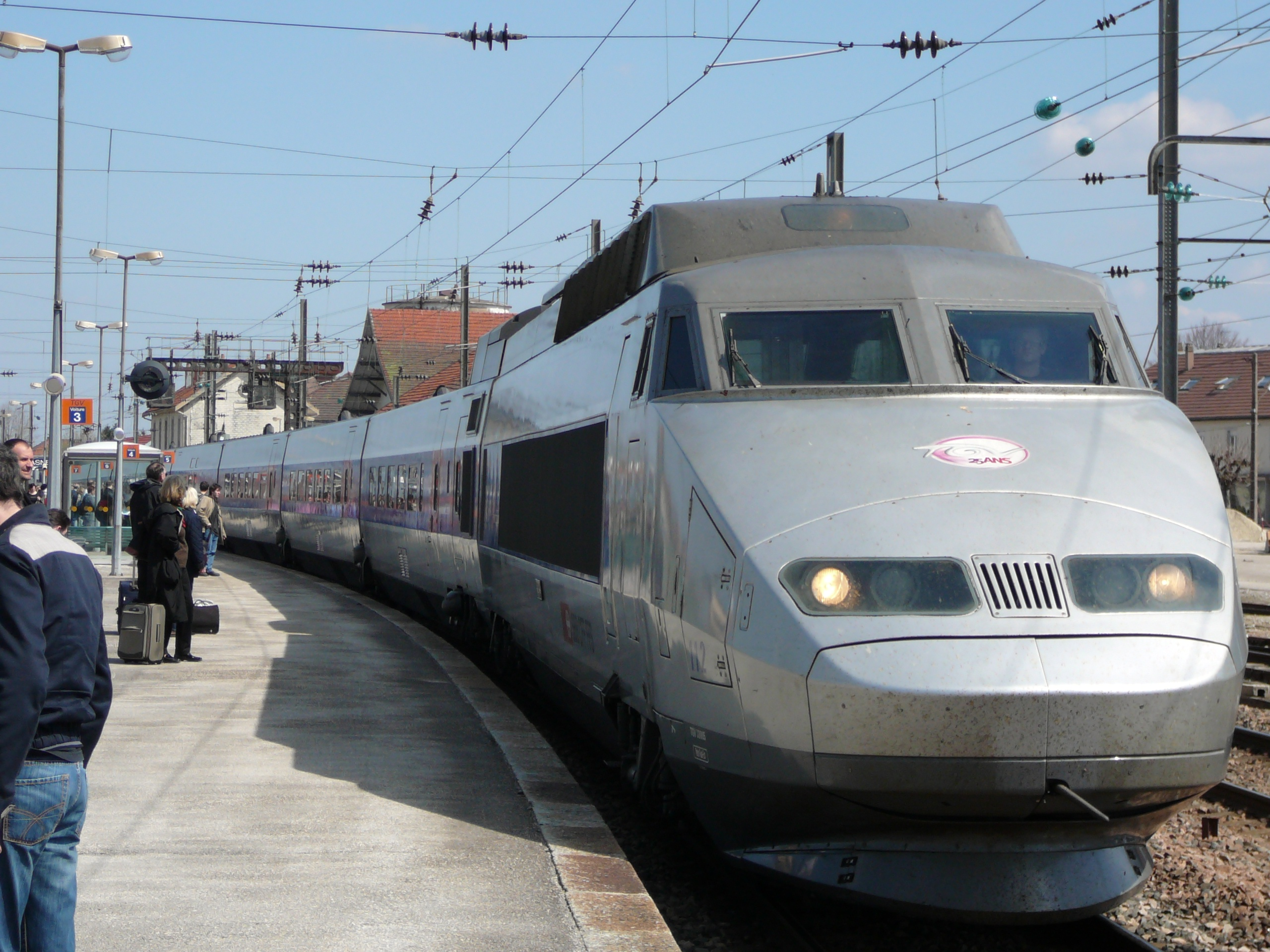 Gare de Frasne (Doubs)